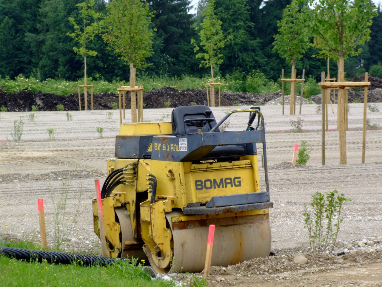 Bomag-Walze